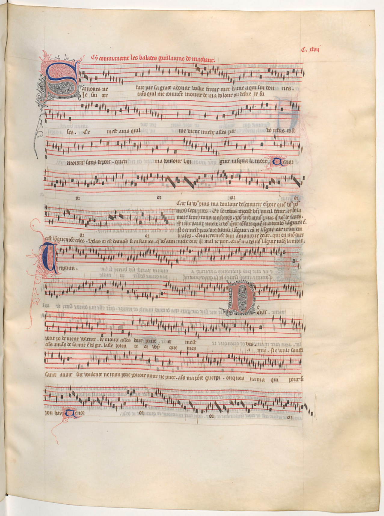 Balada S'amours ne fait par sa grace adoucir nas obras completas de Guillaume de Machaut